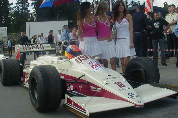 Arrows A10B im Einsatz